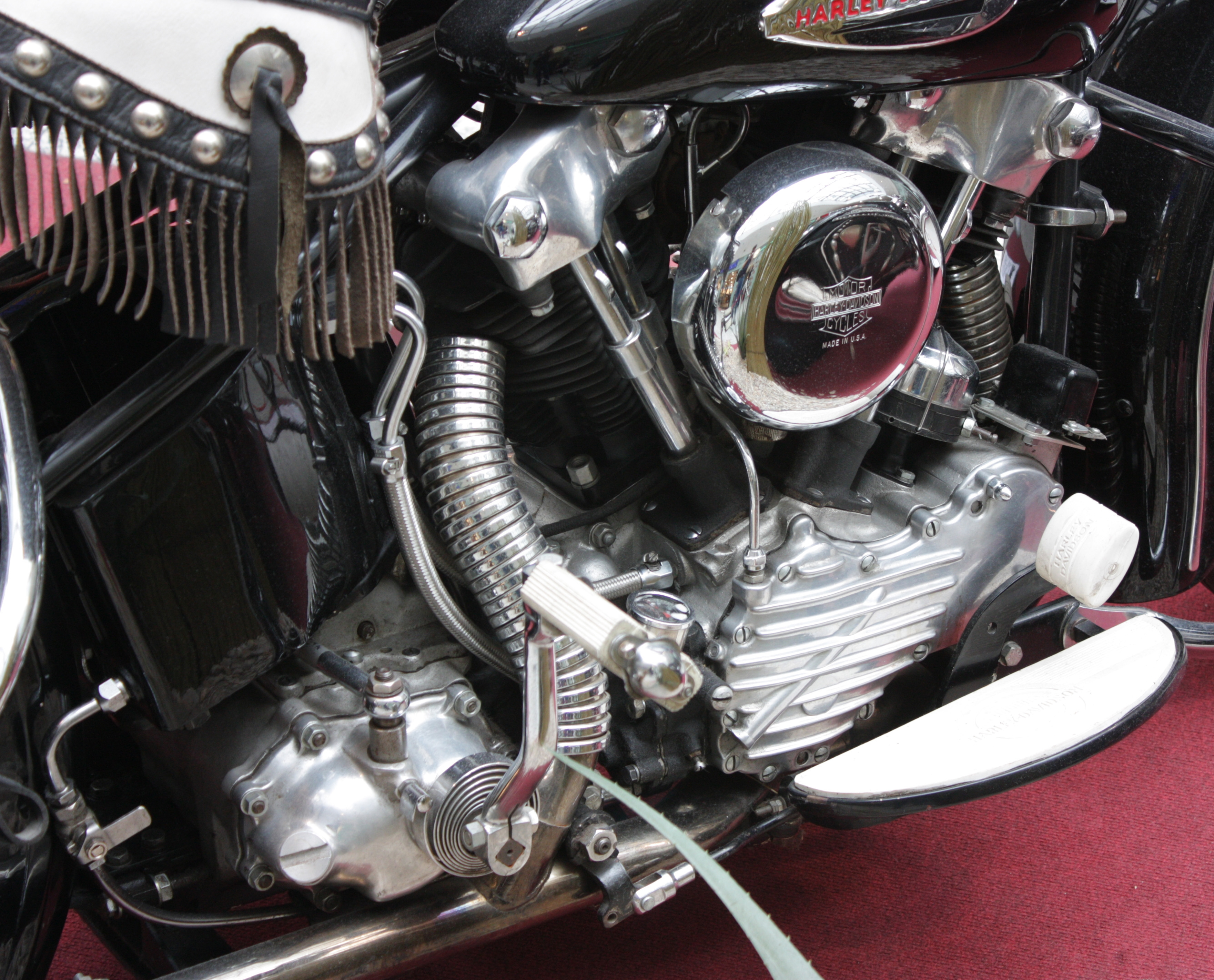 Harley Davidson - Harley Davidson Ausstellung Berlin Ostbahnhof Knucklehead, Baujahr 1947, 54PS, 1200ccm